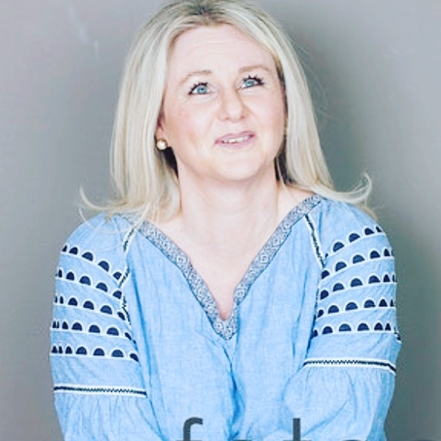 FOTOGRAF: CECILIA HEDSTRÖM